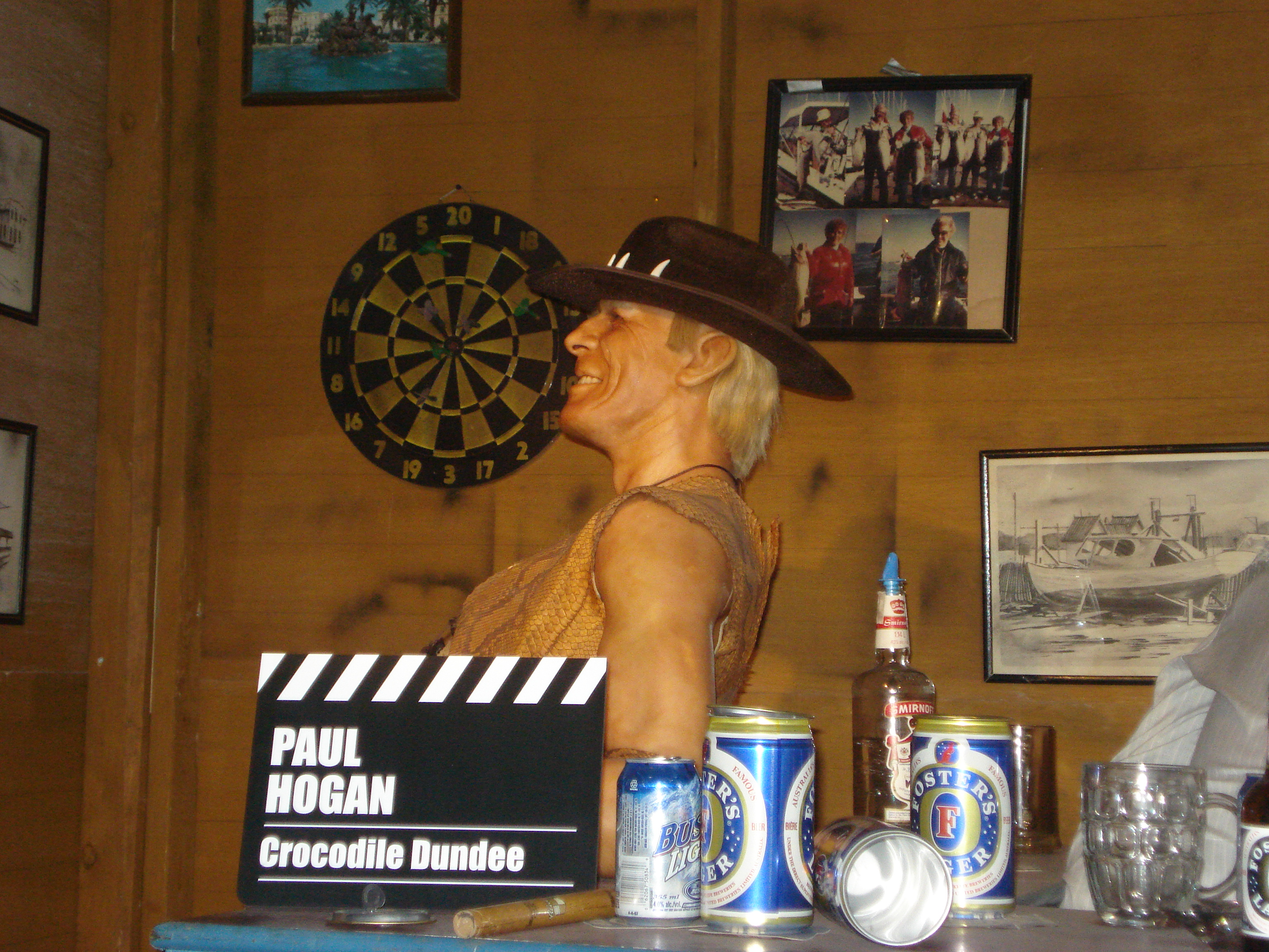 Paul Hogan